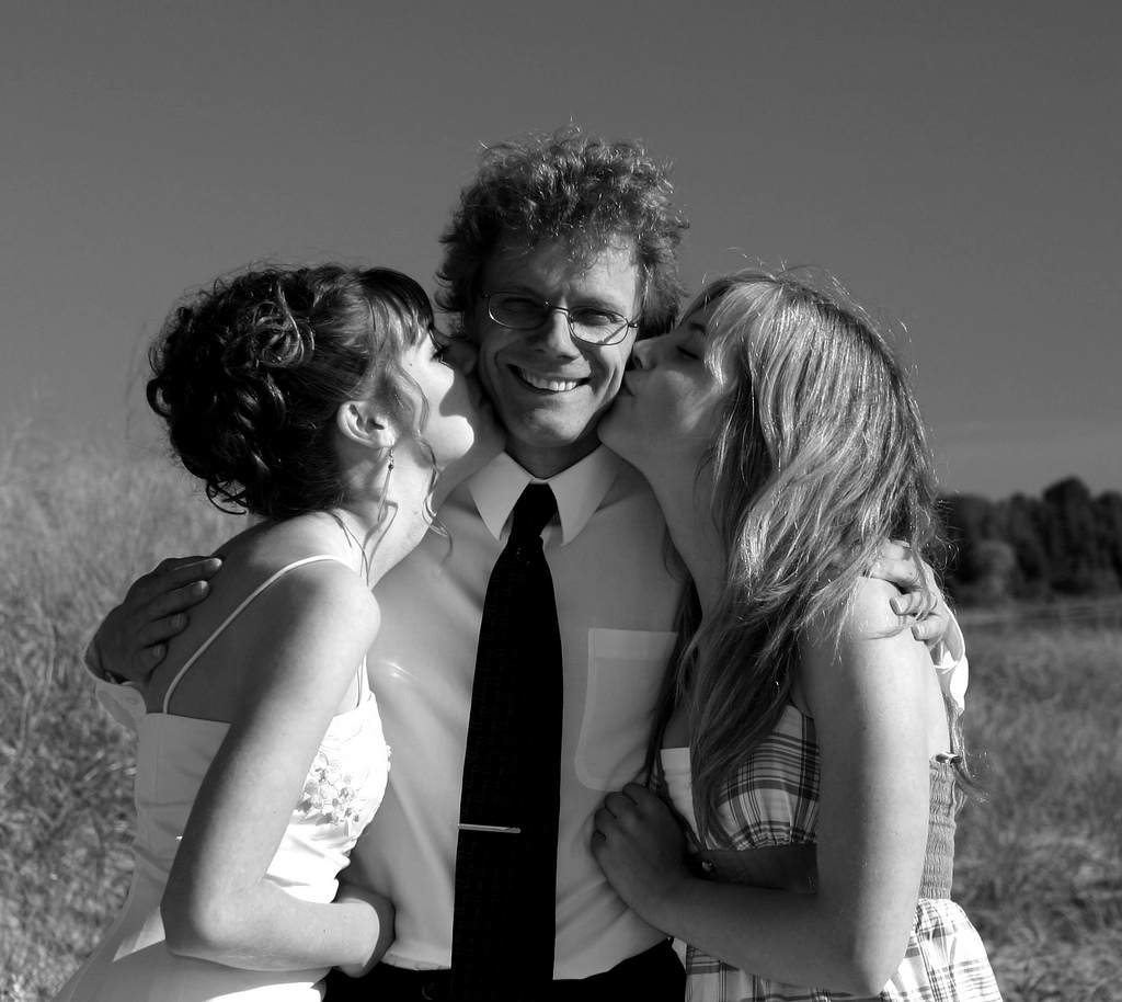 daddy's girls